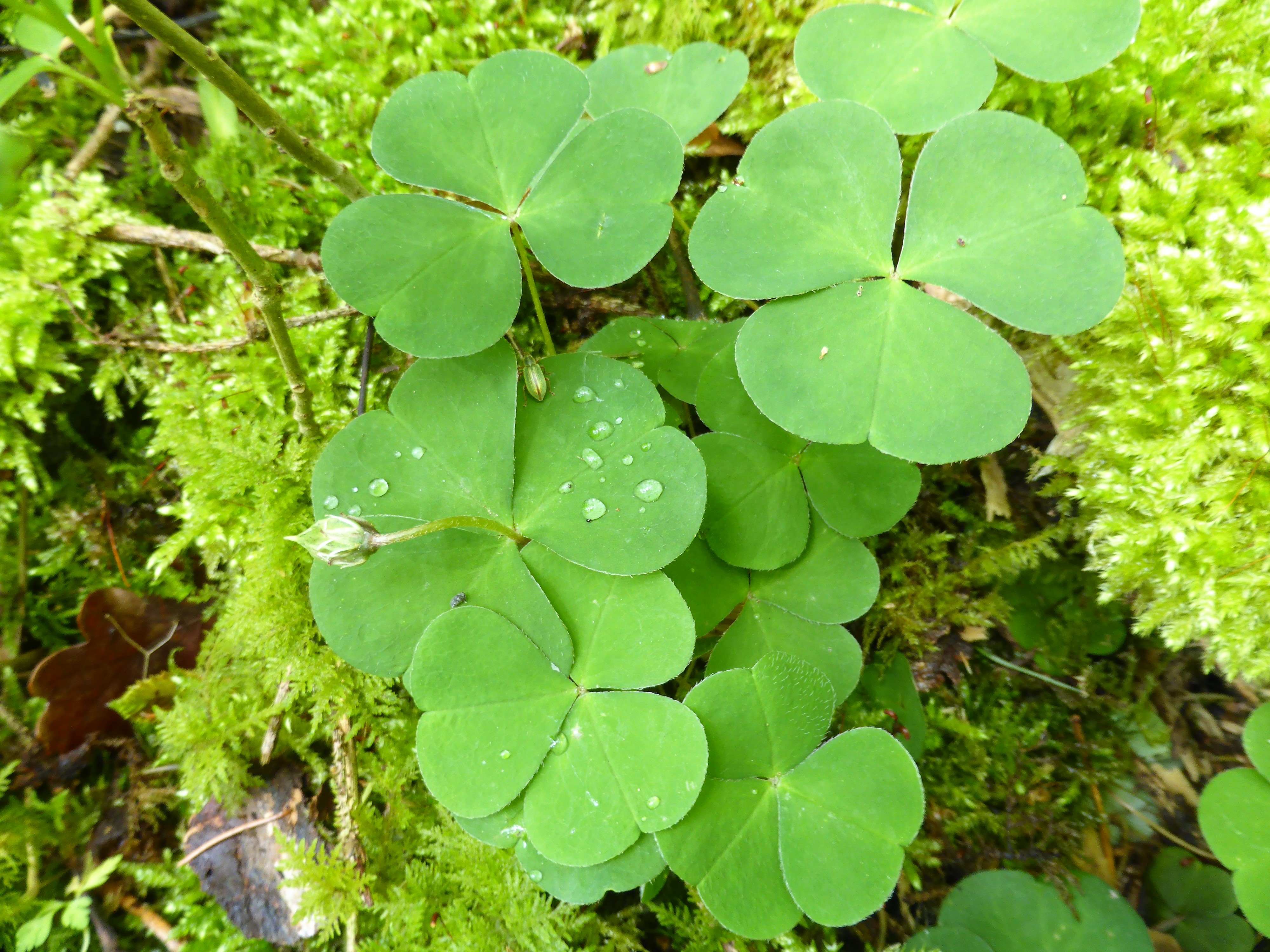 Wald-Sauerklee im Landschaftsschutzgebiet Frauenbrunn am Ortsrand des Marktes Mallersdorf-Pfaffenberg im Landkreis Straubing-Bogen. LSG-00149.01